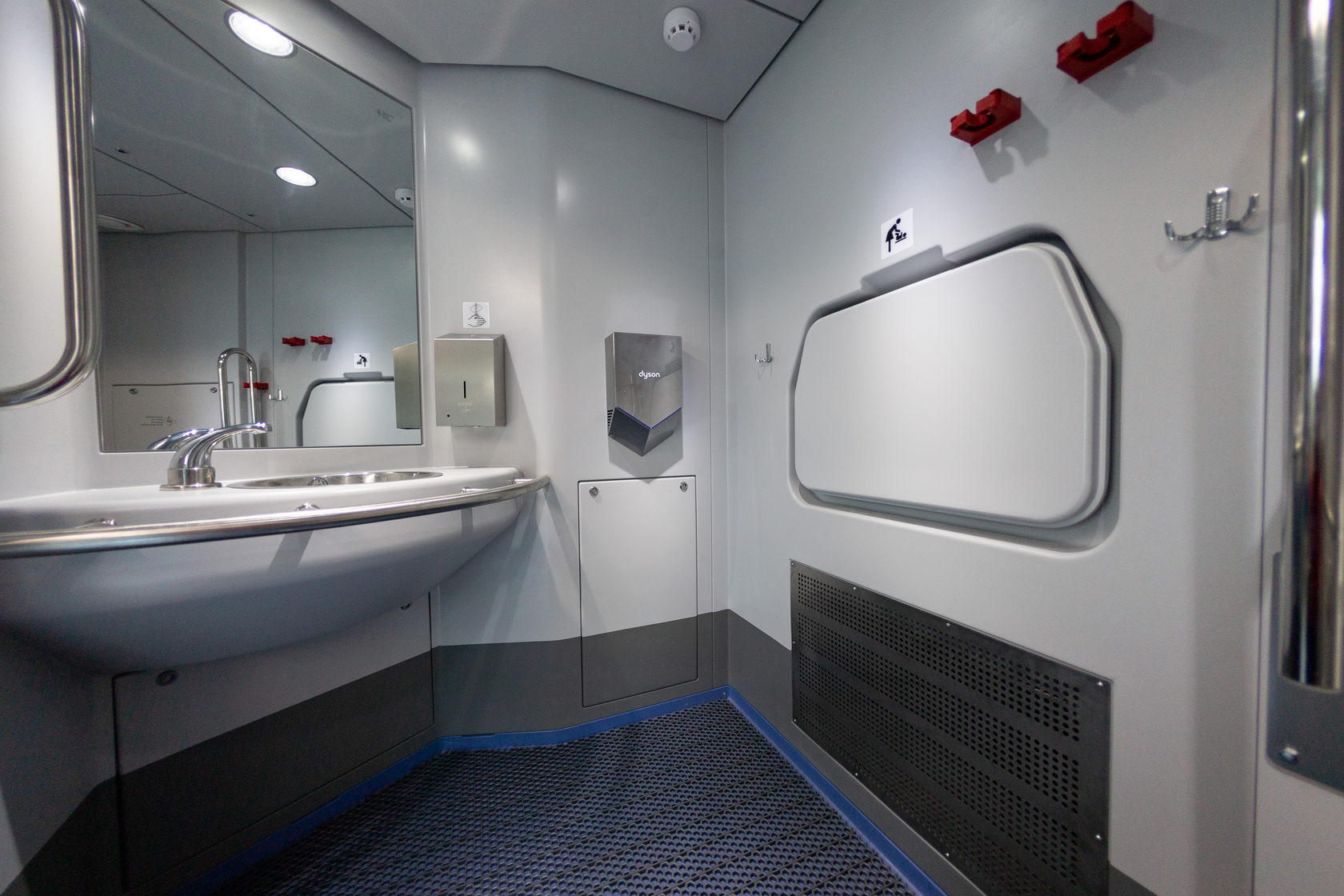 Туалет в головном вагоне электропоезда ЭГ2Тв